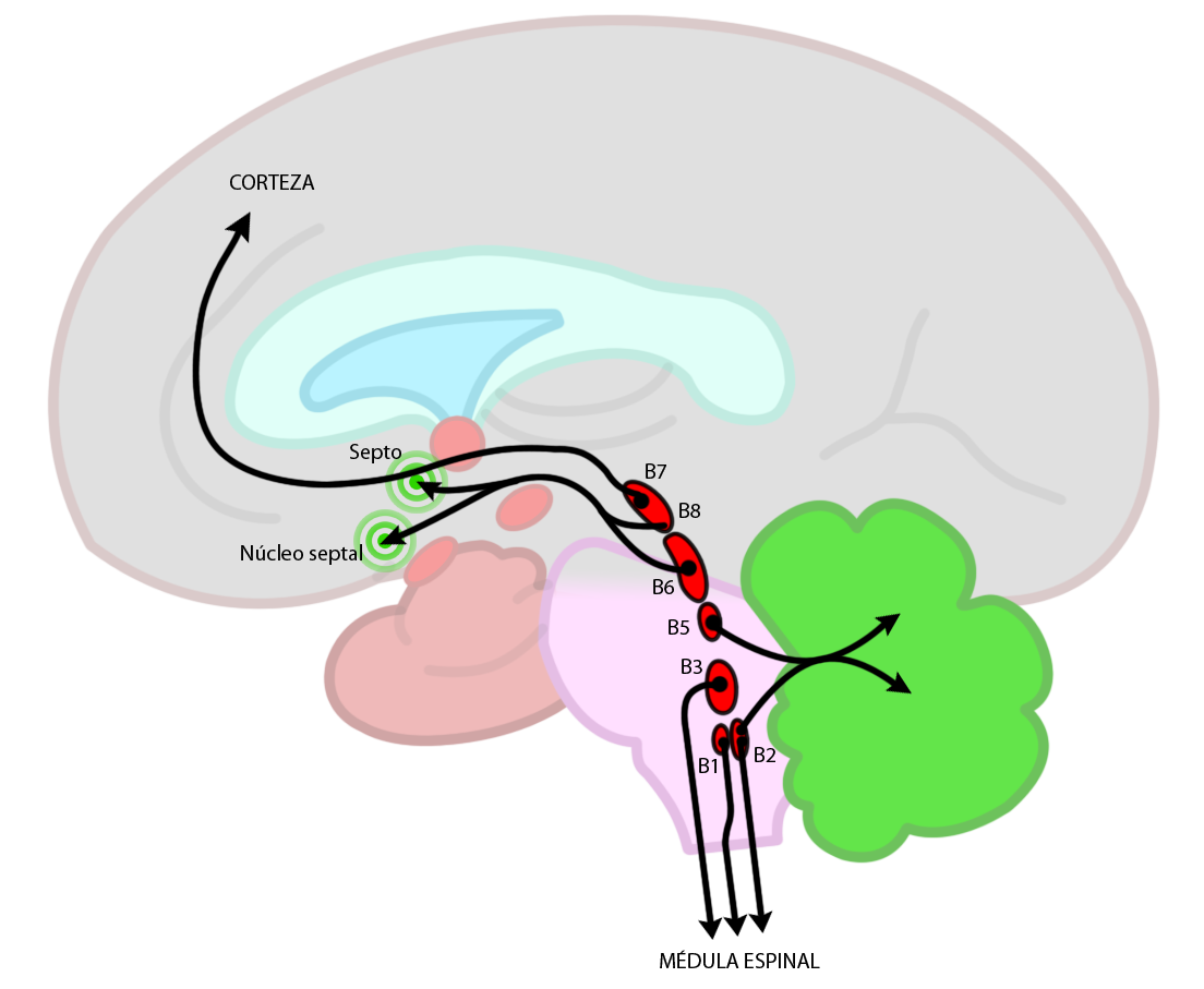 Localización de los núcleos del rafé. Adaptado de: Naidich TP, Duvernoy HM, Delman BN, Sorensen AG, Kollias SS, et al. (2009) Duvernoy’s Atlas of the Human Brain Stem and Cerebellum: Springer-Verlag/Wien. 876 p.